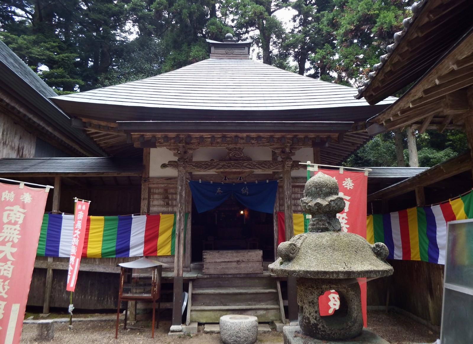 高縄寺の大師堂